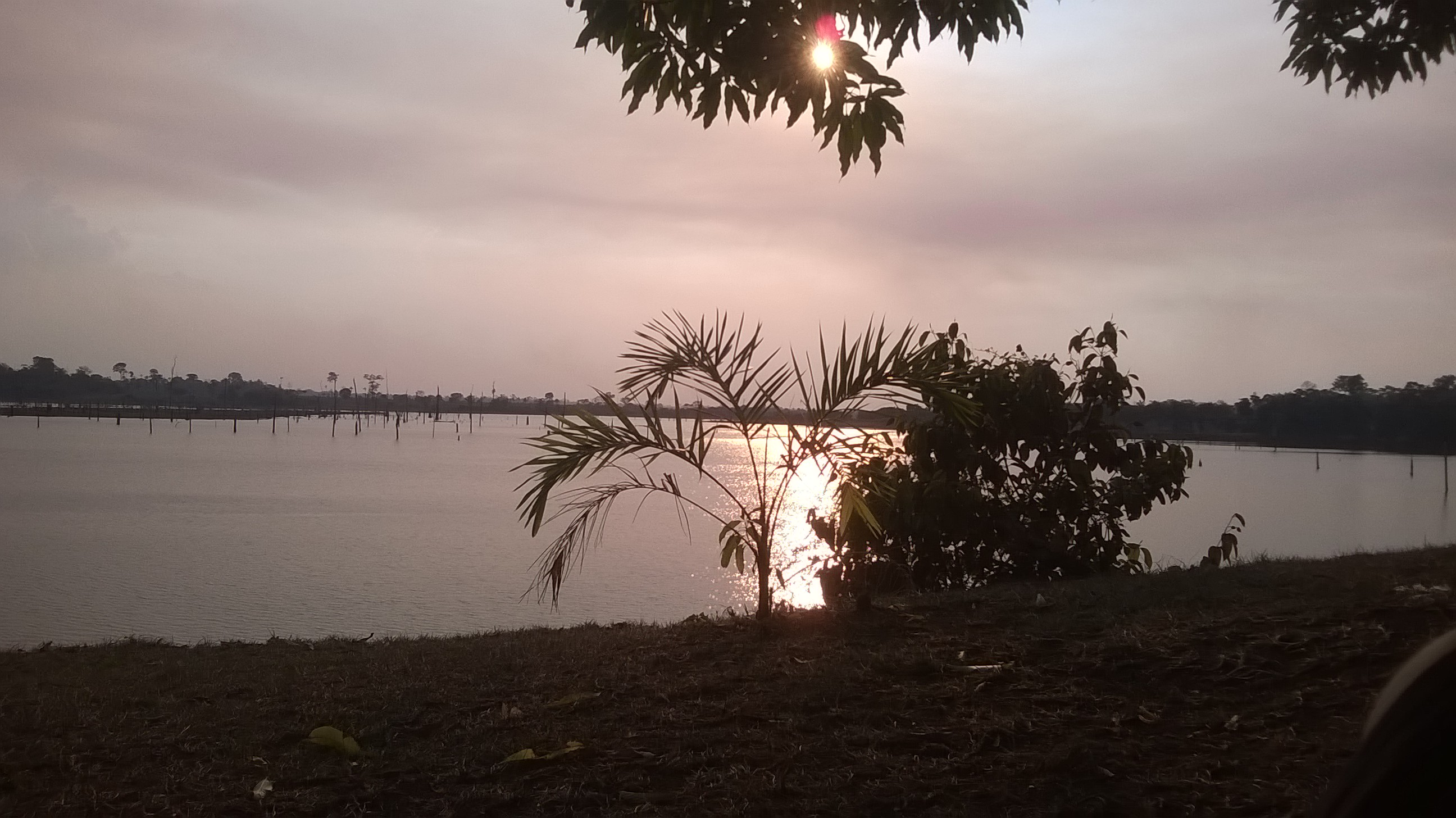 Rio Jamari próximo a área urbana do município de Itapuã do Oeste (Rondônia)